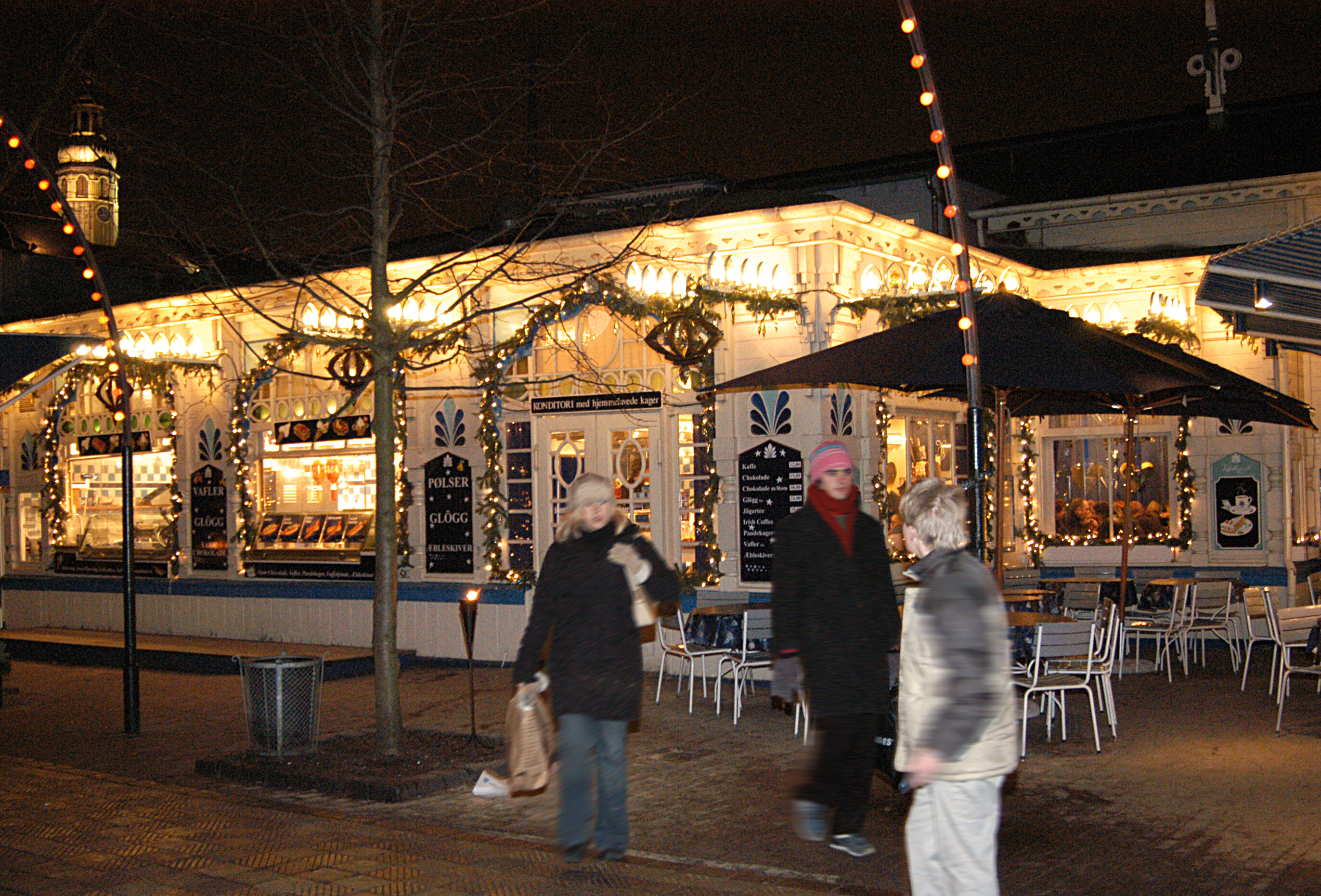 Tivoli-Vaffel bageriet